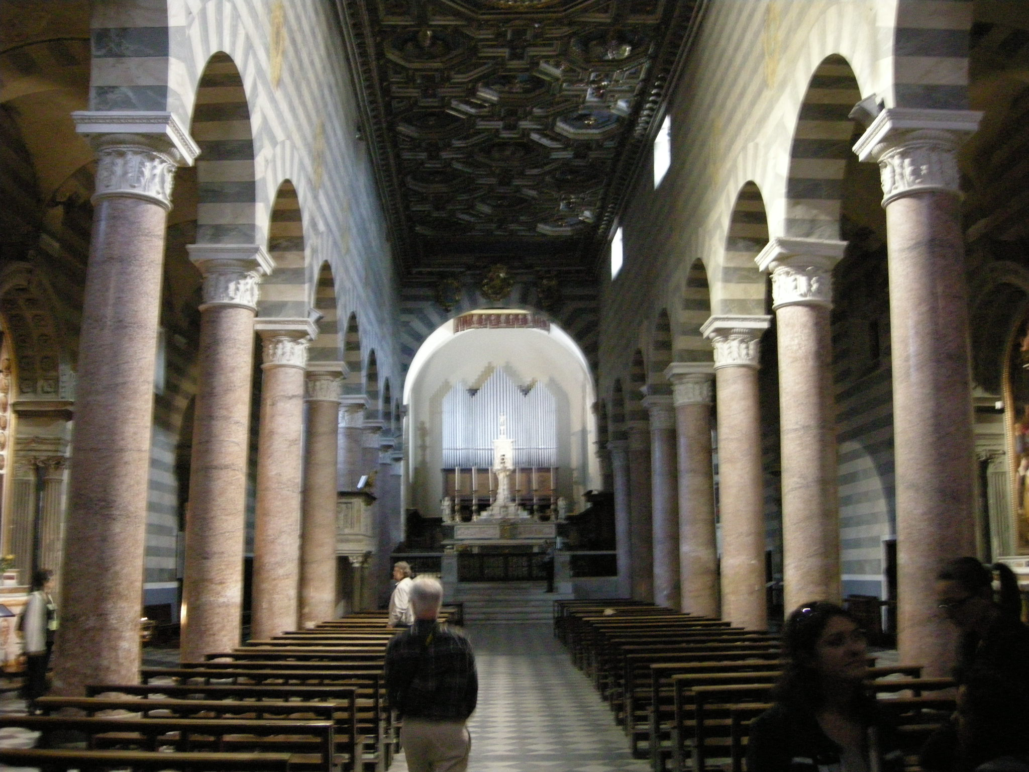 Duomo di volterra, interno